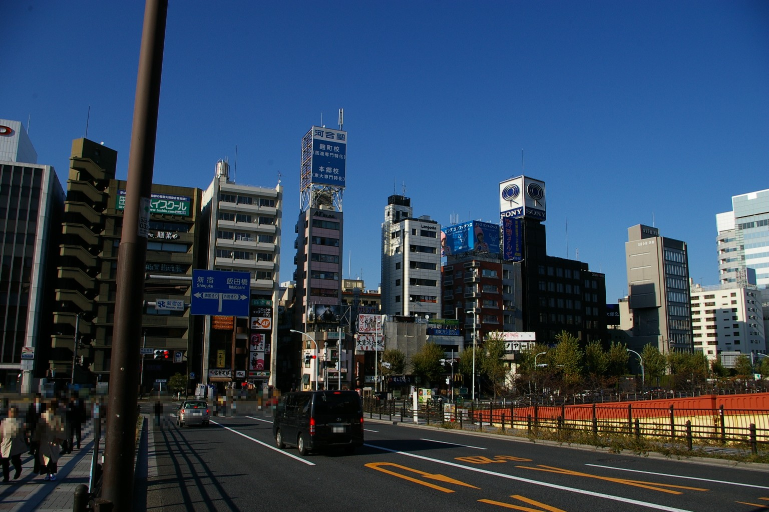 2009年投稿者が東京都内で撮影。